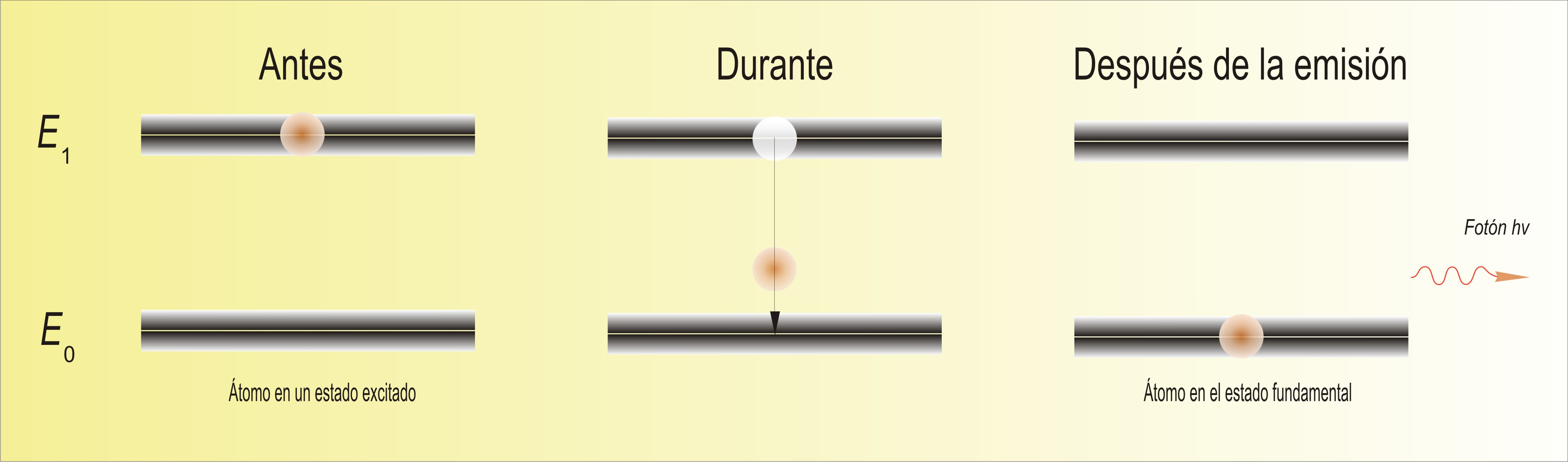 En la imagen se aprecia la secuencia temporal en la que un electrón emite espontáneamente un fotón al efectuar un tránsito desde un estado excitado al estado fundamental. Dicha imagen se ha creado usando un programa de dibujo vectorial y se ha exportado en formato png. Puede ser usada para cualquier finalidad puesto que es el autor de ella el que cede todos los derechos.